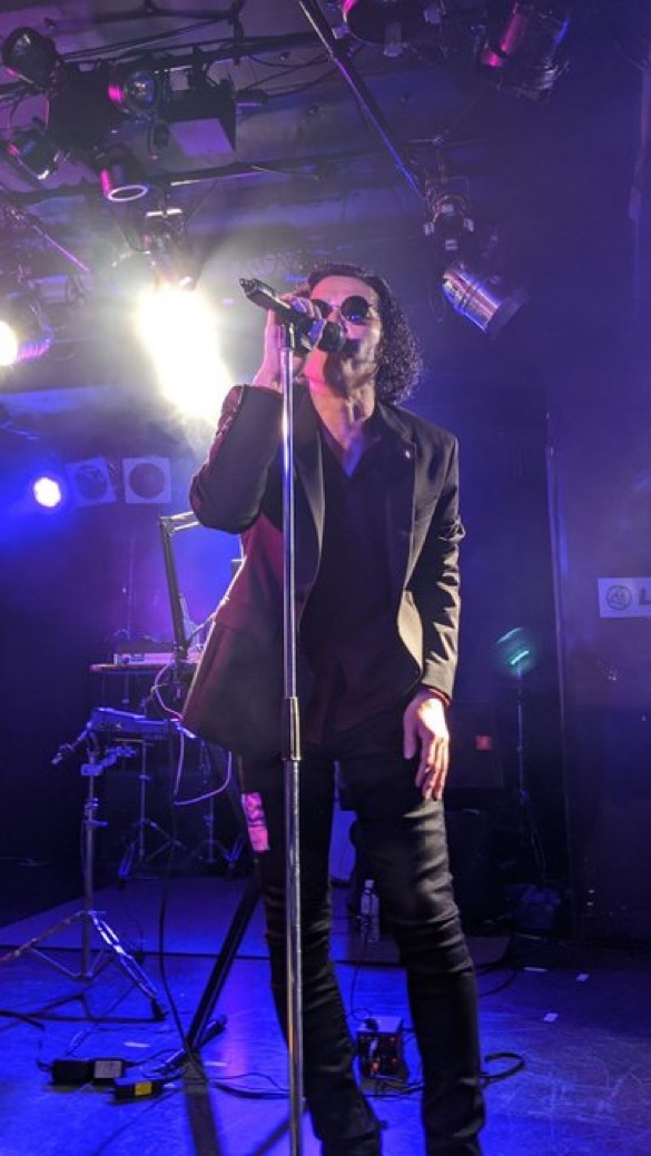 ミュージシャンHAAPの全身画像